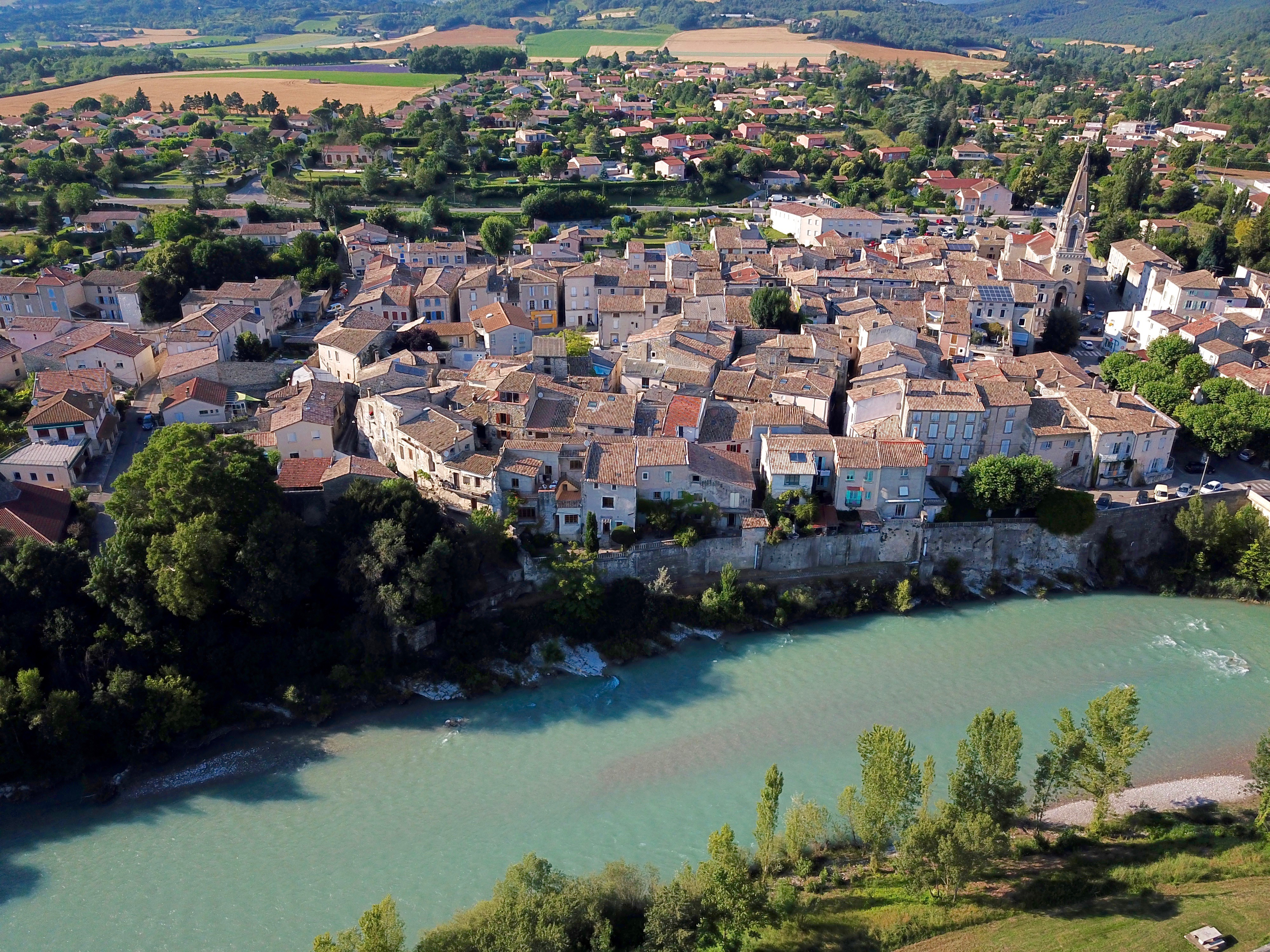 Le village ancien d'Aouste le 20 juin 2018, la rivière Drôme naturellement bleue turquoise